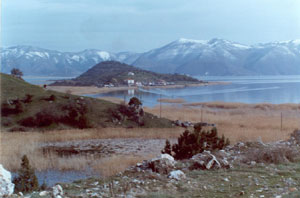 Φωτογραφία από την περιοχή των Πρεσπών Άδεια χρήσης Το παραπάνω αρχείο διανέμεται υπό τις δύο παρακάτω άδειες χρήσης. Μπορείτε να επιλέξετε την άδεια της προτίμησής σας.